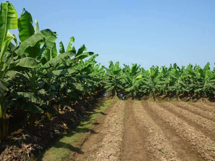 കോടുശ്ശേരി-കൃഷി